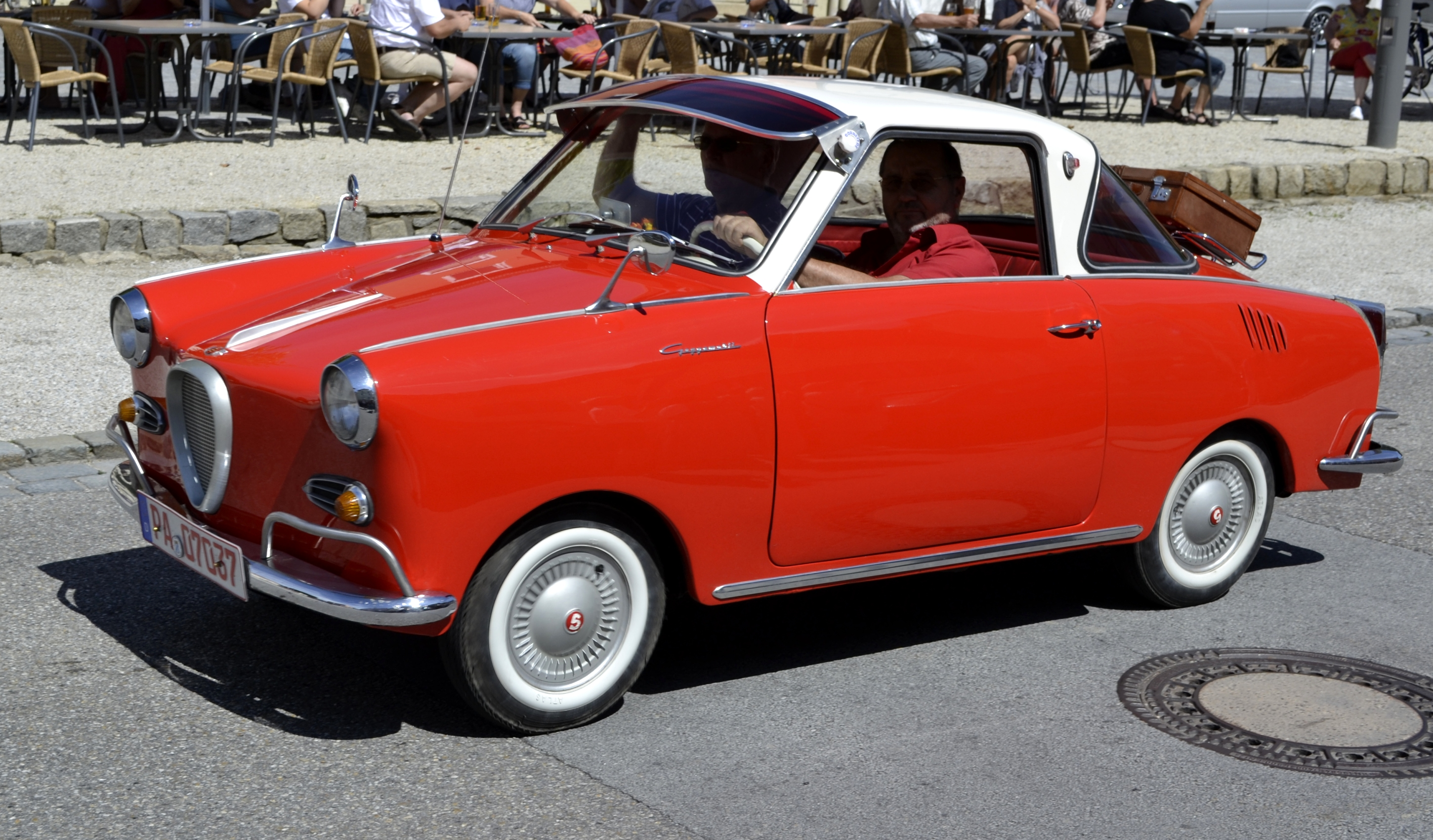 Glas Goggomobil Coupé.